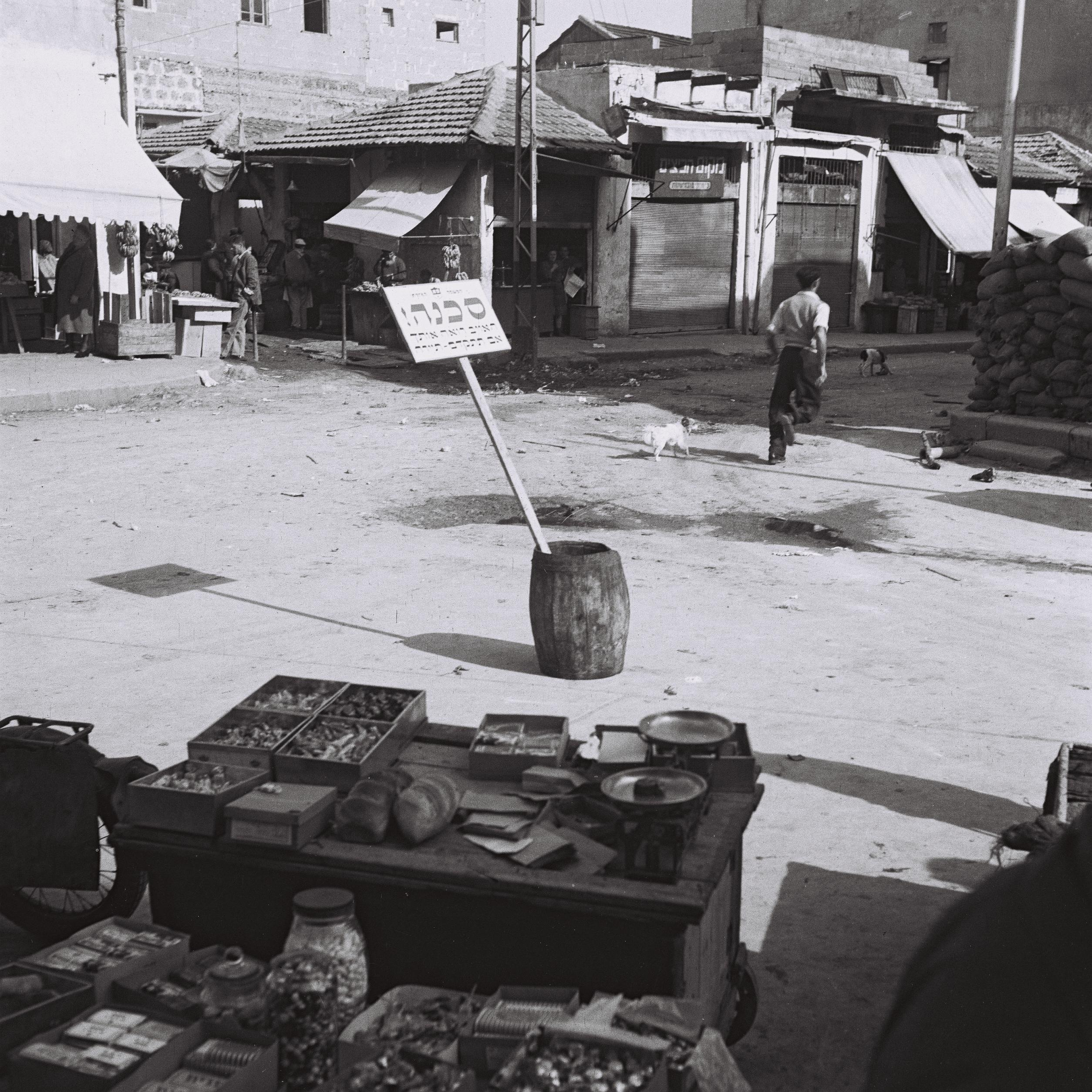 פברואר 1948, שלט אזהרה במרכז שוק הכרמל בתל אביב המזהיר עוברים ושבים מפני אש צלפים הנורית אל השוק מצריח מסגד חסן בק